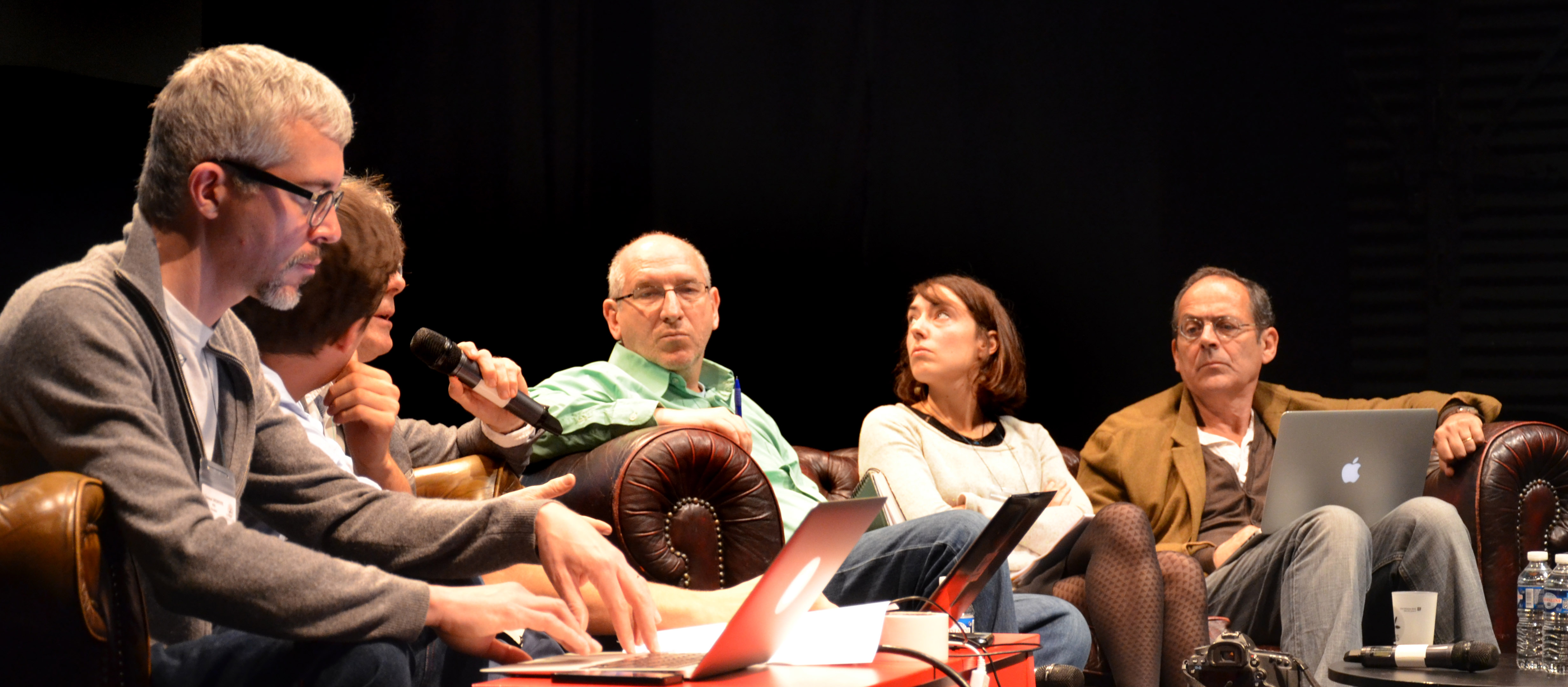 Plénière/table ronde » de la 11ème édition des ROUMICS (« Rencontres Ouvertes du Multimédia et de l’Internet Citoyen et Solidaire » Novembre 2014, 0 LIlle), organisée par l’association ANIS, avec le collectif Catalyst en 2014 sur le sujet du « Bien commun » en lien avec le monde du numérique. Avec notamment Amandine Piron (cofondatrice de l'association Collporterre) ; Michel Bauwens ; Bernad Stiegler ; Michel Briand (anciennement élu brestois (1995-2014), en charge d'Internet et expression multimédia, de l'Économie sociale et solidaire et de l’aménagement numérique du territoire. Il a aussi été membre du Conseil national du numérique. Responsable de la formation à IMT Atlantique (Bretagne-Pays de la Loire). Emmanuel Vandamme (consultant en TIC et en innovation sociale et numérique, Président d’ANIS, responsable du Pôle Numérique de l’École Supérieure de Journalisme (ESJ) de Lille,) ; Simon Sarazin, (confondateur de la Coroutine, et travaillant sur le thème des « communs »)